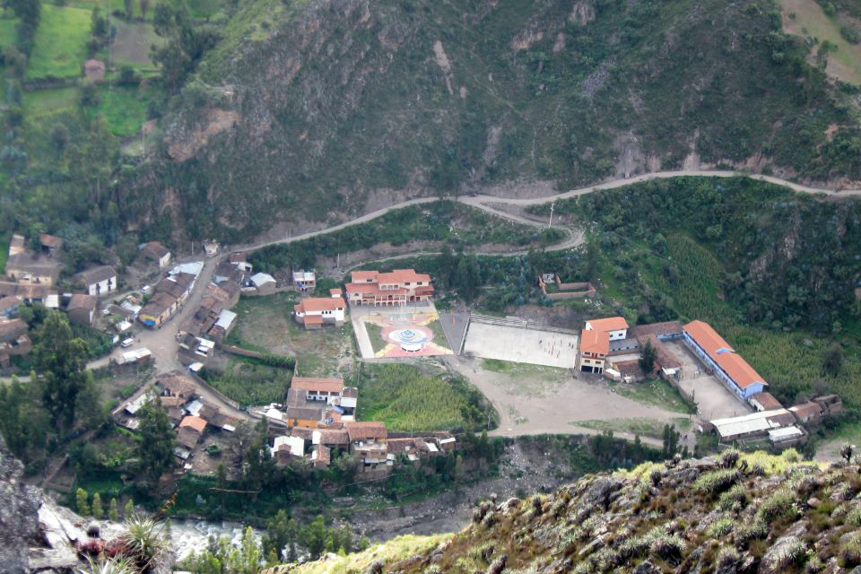 Pueblo de Acochaca.